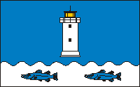 Meeksi valla lipp